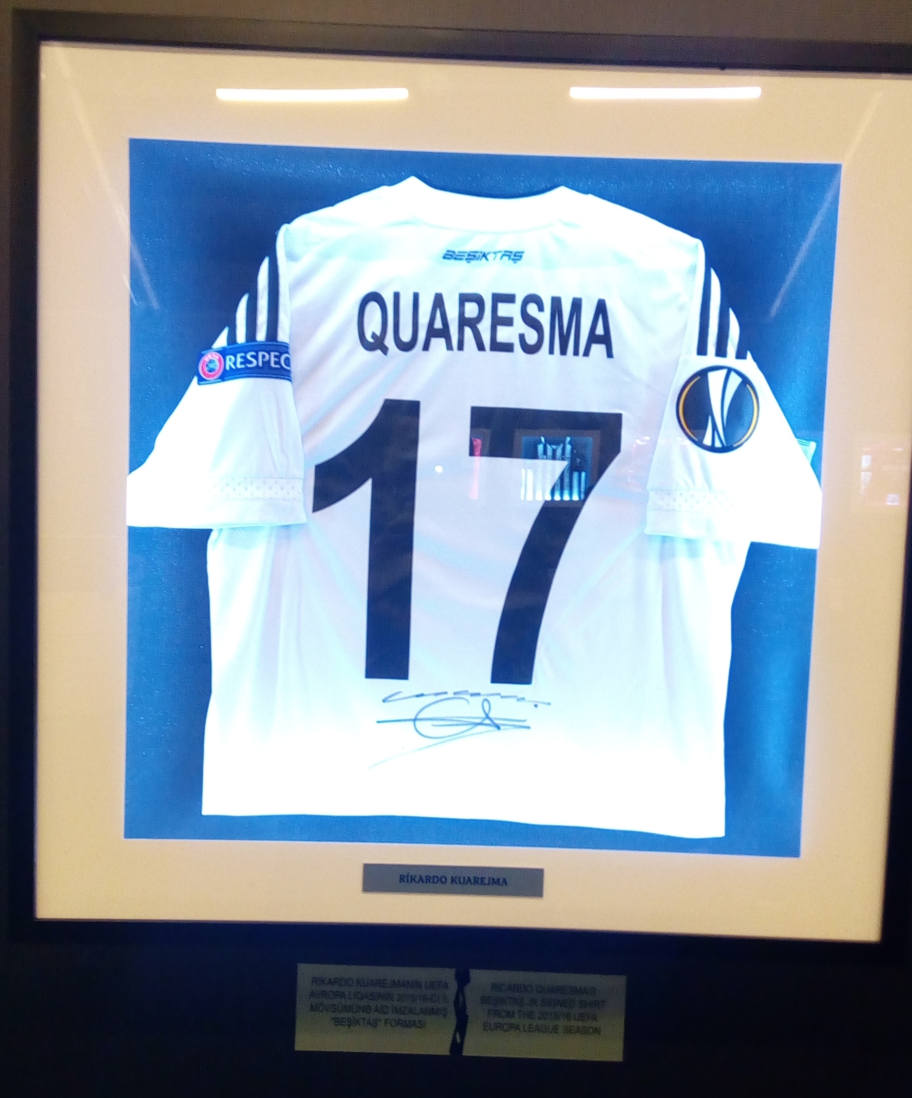 Avropa Liqası Muzeyi Bakıda